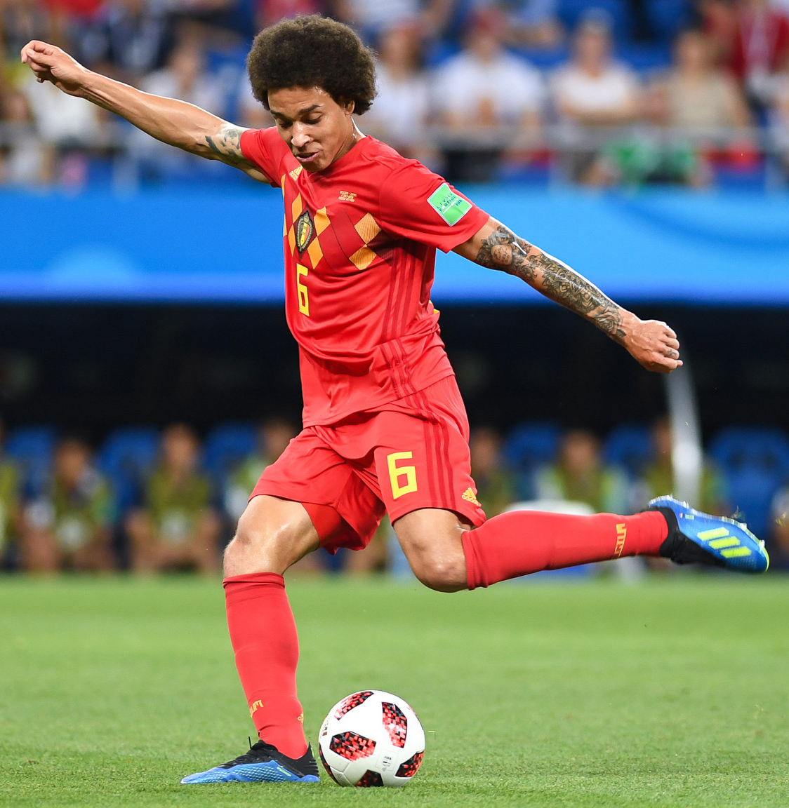 Потрясающий камбэк сборной Бельгии в матче с Японией